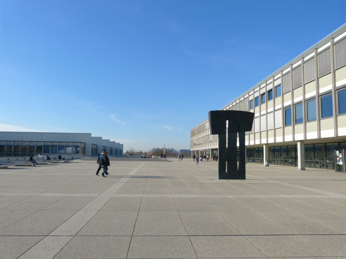 Campus der Pädagogischen Hochschule Ludwigsburg mit Blick auf die Gebäude 1 und 3